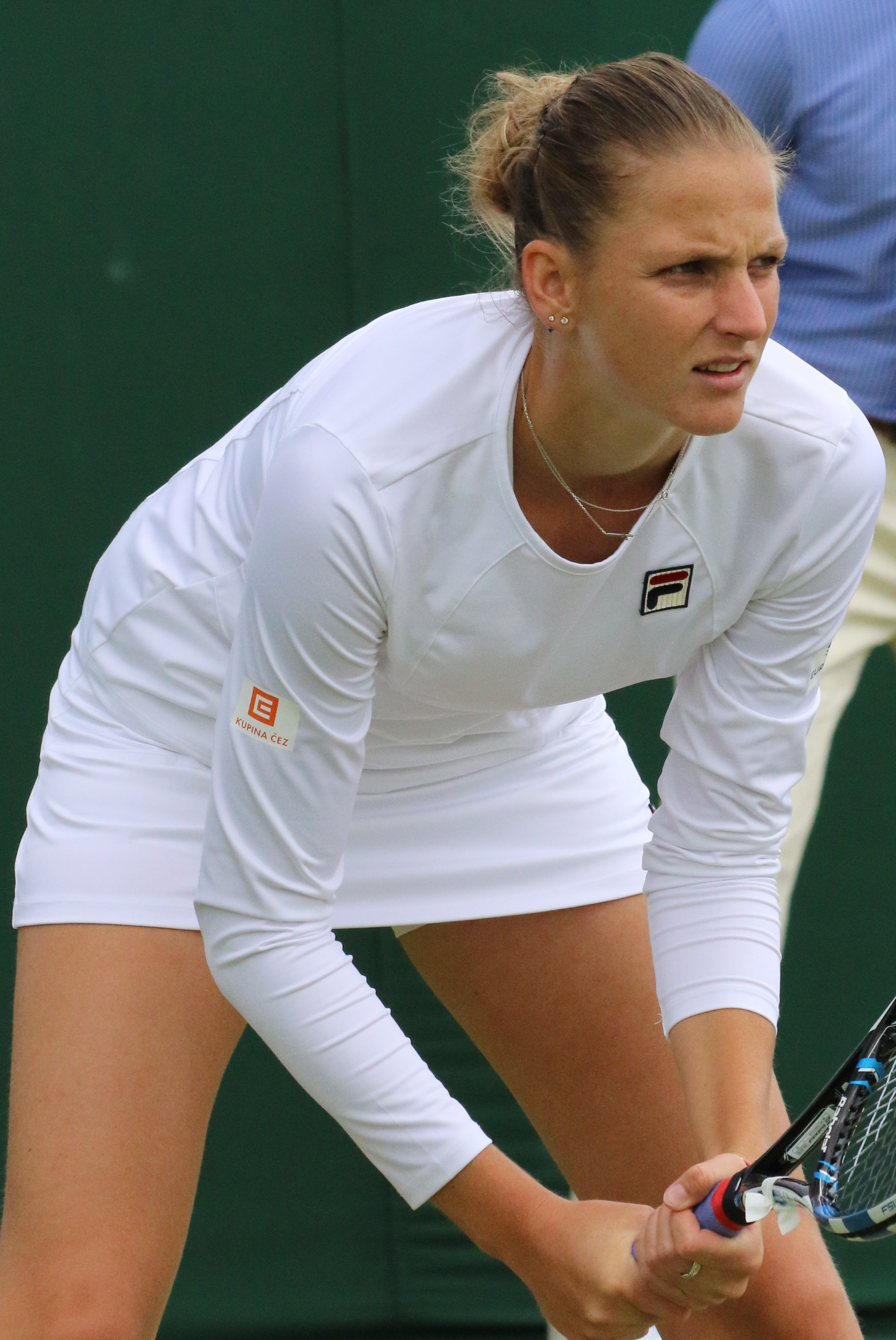 Pliskova Ka. WM16 (5)